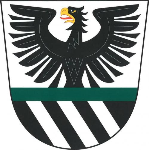 Ostašov, znak obce